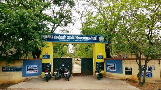 அரசு ஆண்கள் மேனிலைப்பள்ளி - பெரணமல்லூர்